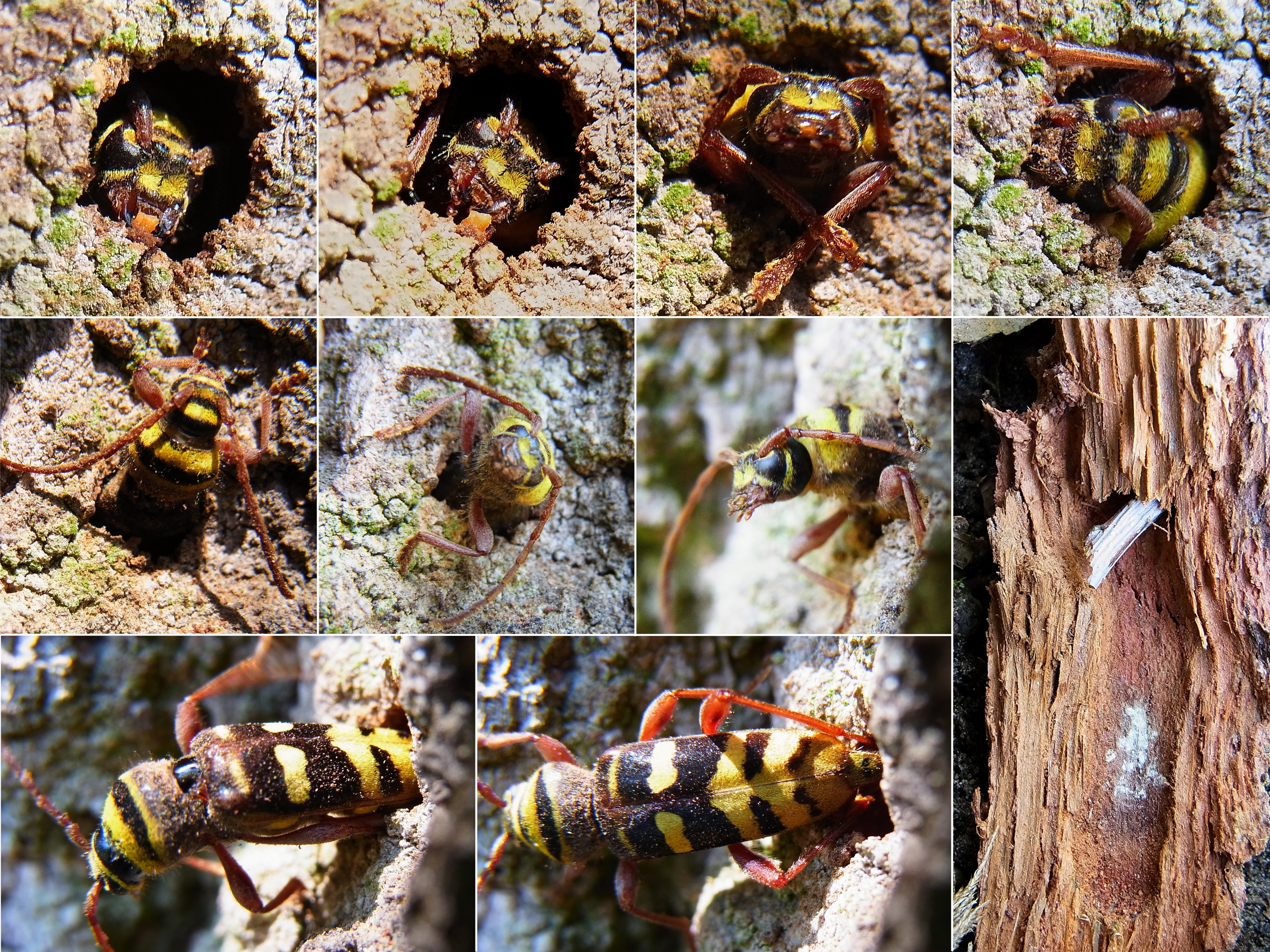 Verschiedene Schlupfphasen von Plagionotus detritus aus der Puppenkammer (rechts unten) in der Rinde einer Eiche am 7.6.2012 in Ungarn bei Ópusztaszer